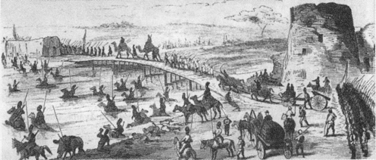 Переправа соединенных отрядов генерала Веревкина через канал Шах-Абат, 25 мая 1873 года.